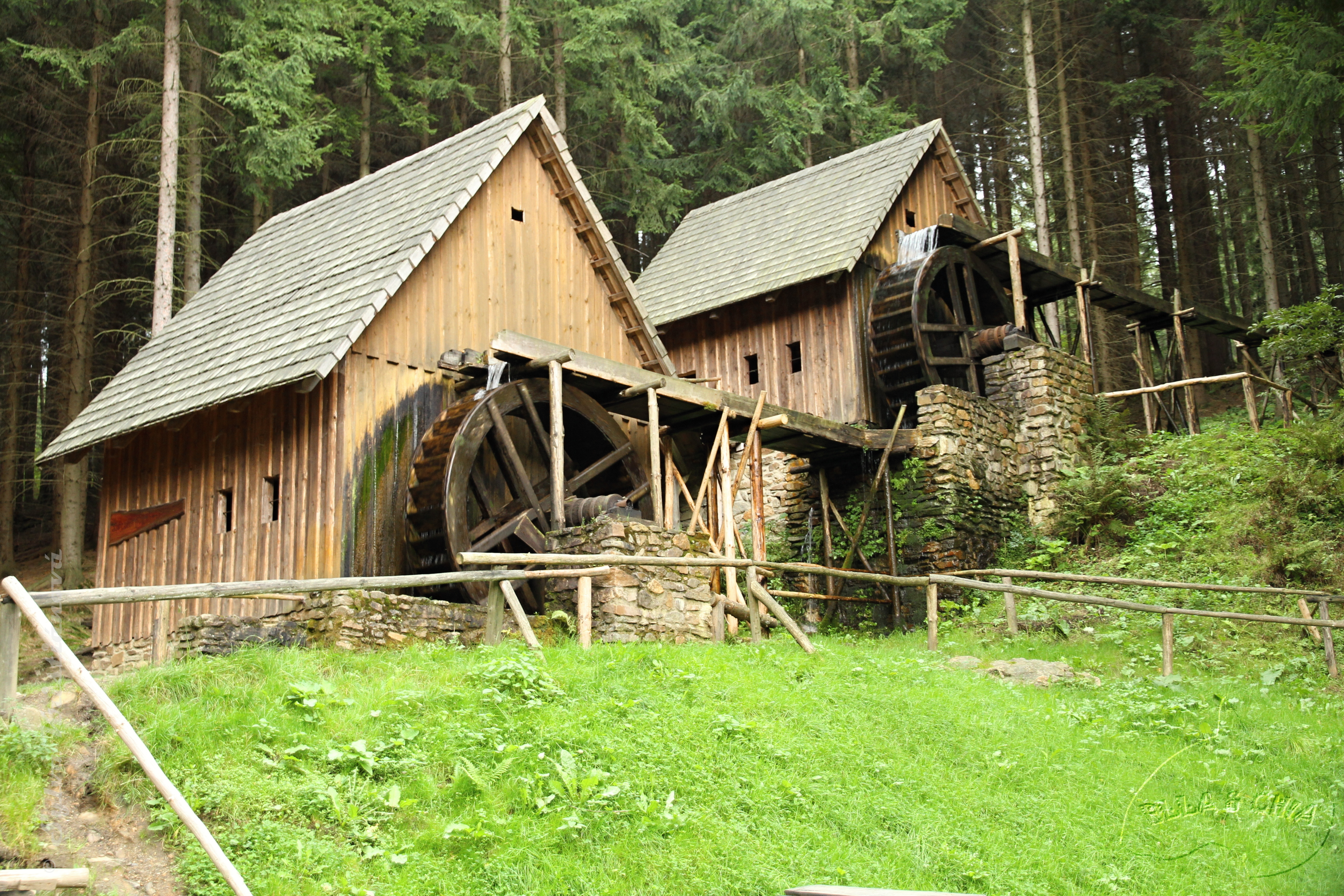 Zlatorudné mlýny v roce 2012